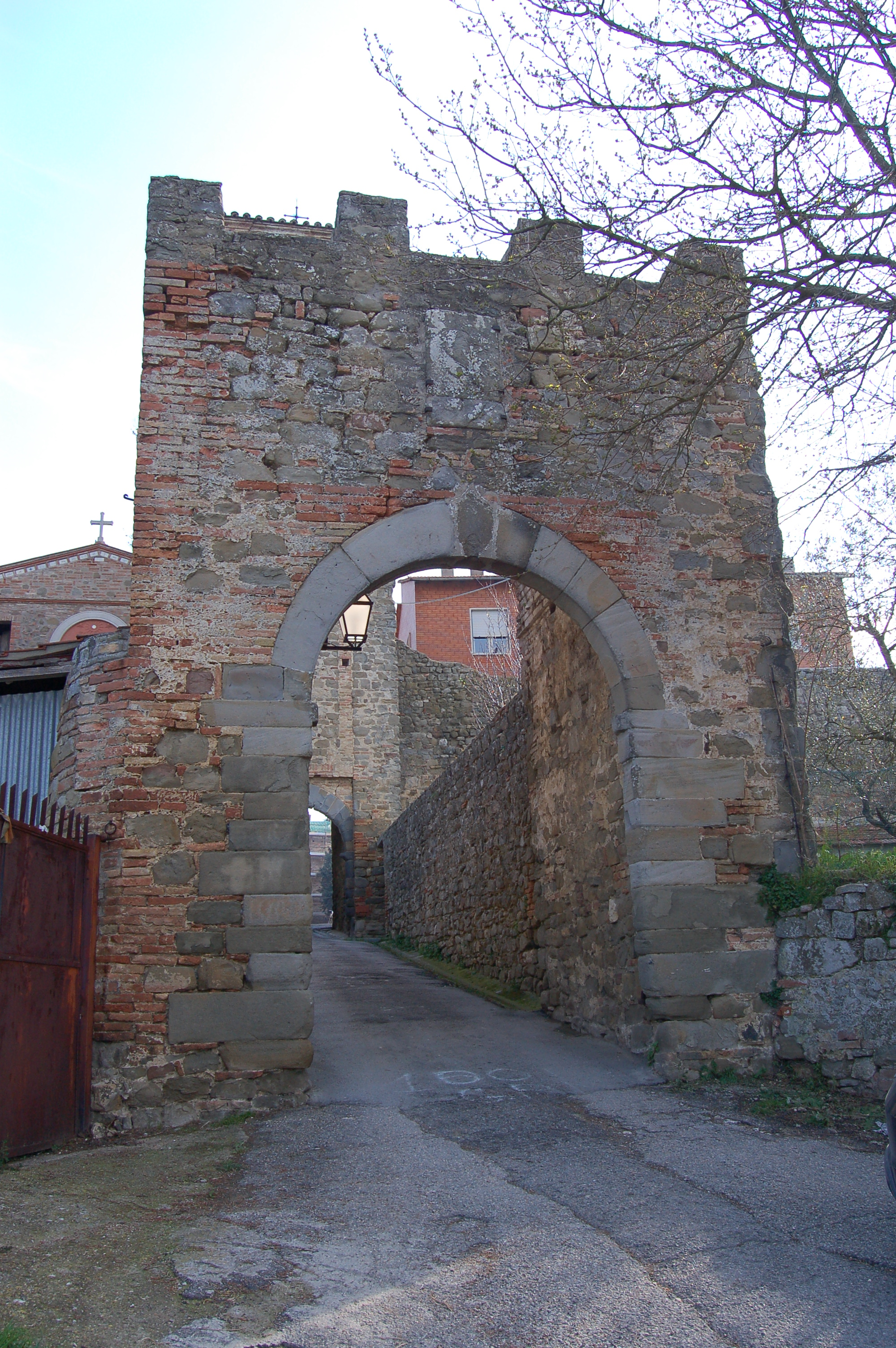 Una delle due entrate del paese